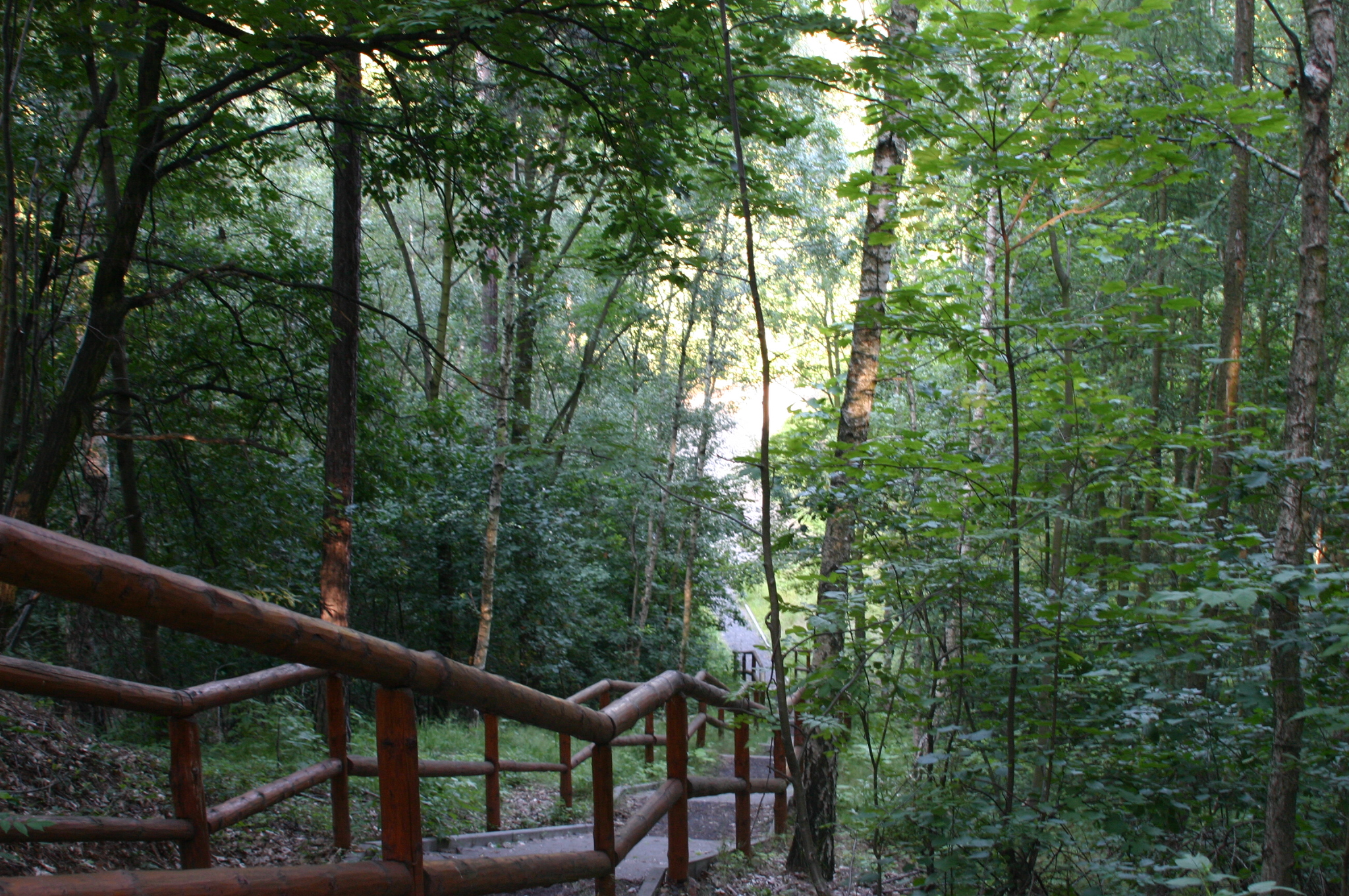 Přírodní amfiteátr na kopci Ressl u Mostu